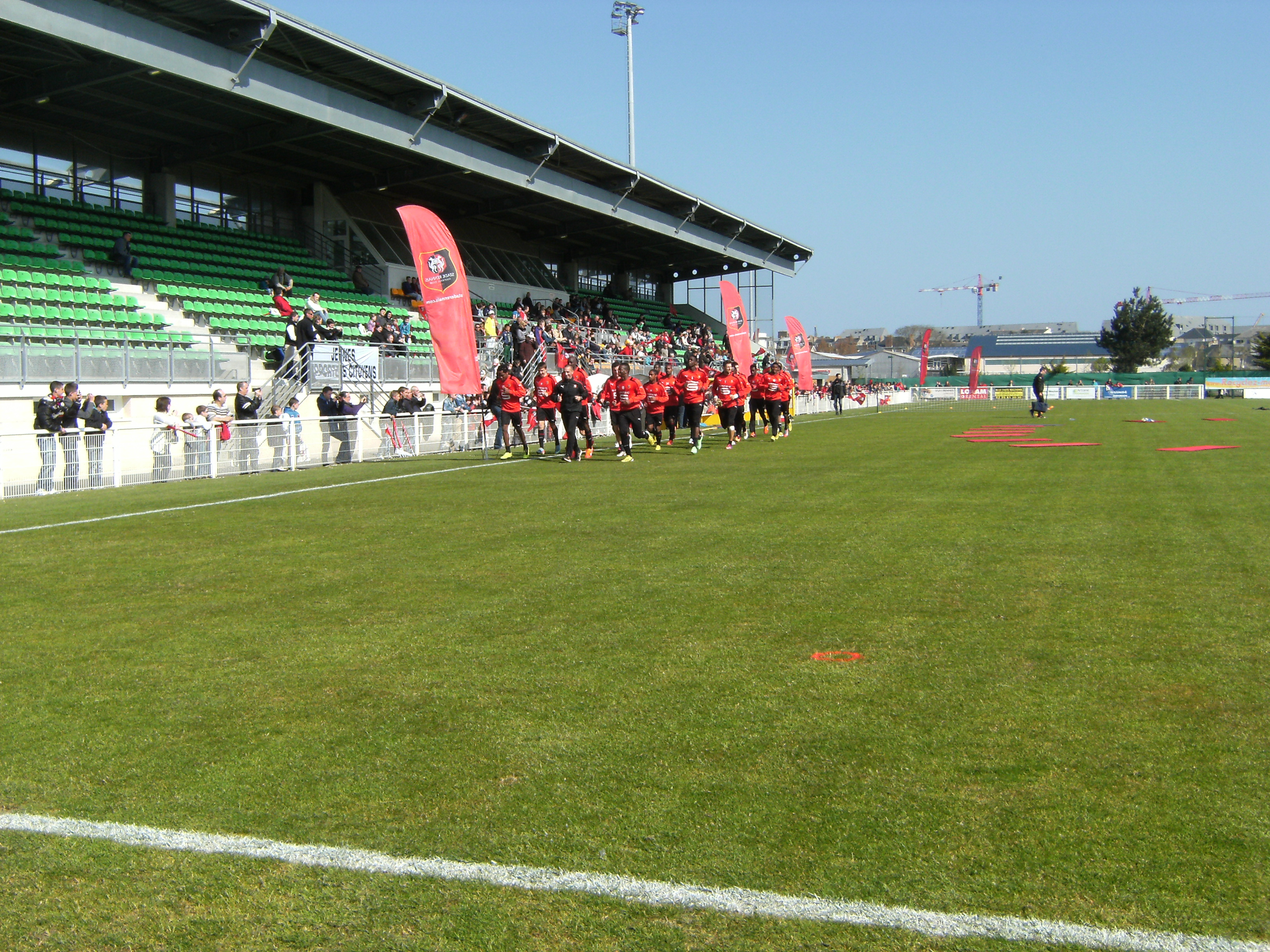 Photo prise lors d'un entraînement du Stade rennais au stade de Marville de Saint-Malo le 3 mai 2013. Footing d'échauffement pour les joueurs rennais.